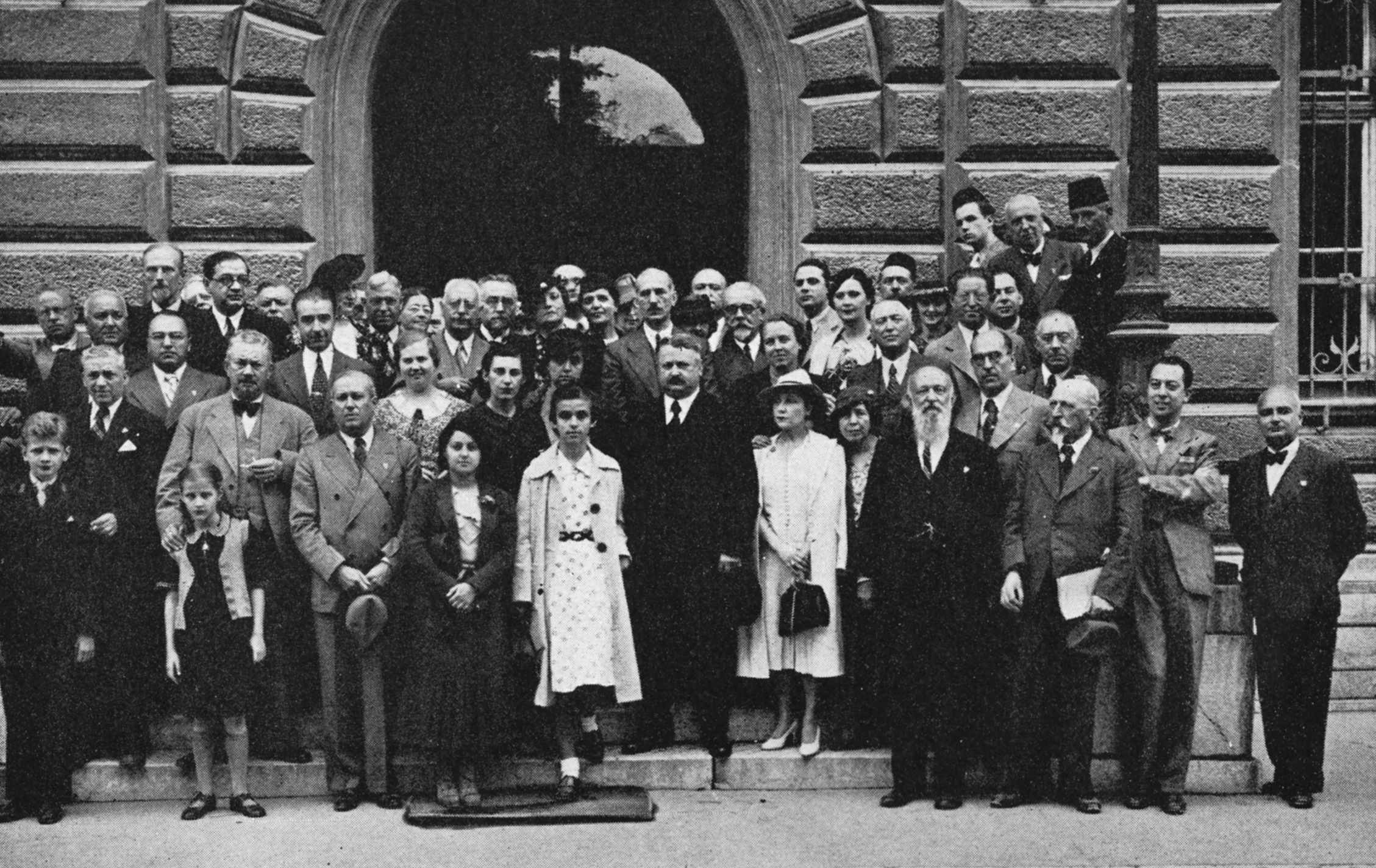 Gruppenfoto vom 11. Internationalen Kongress für Geschichte der Medizin in Sarajevo